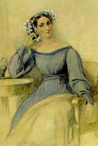 Т. Уинс (1782-1857) Портрет Д. Ф. Фикельмон. 1826